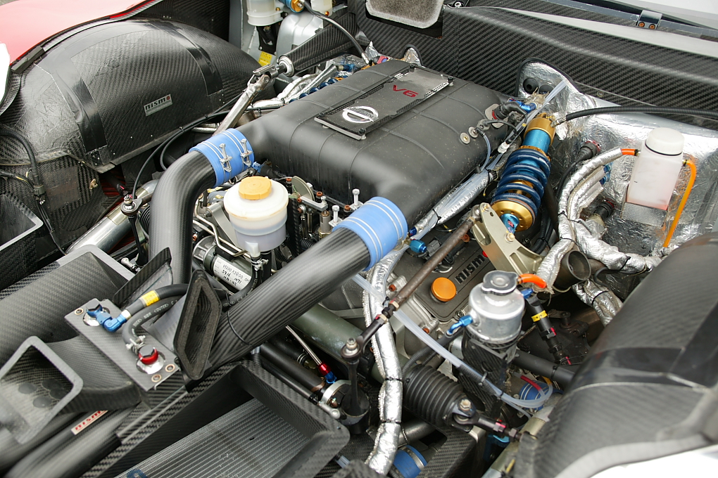 '05 Nissan VQ30DETT Engine for Super GT.